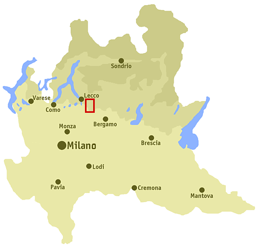 Posizione della Valle San Martino, province di Bergamo e Lecco, Lombardia, Italy